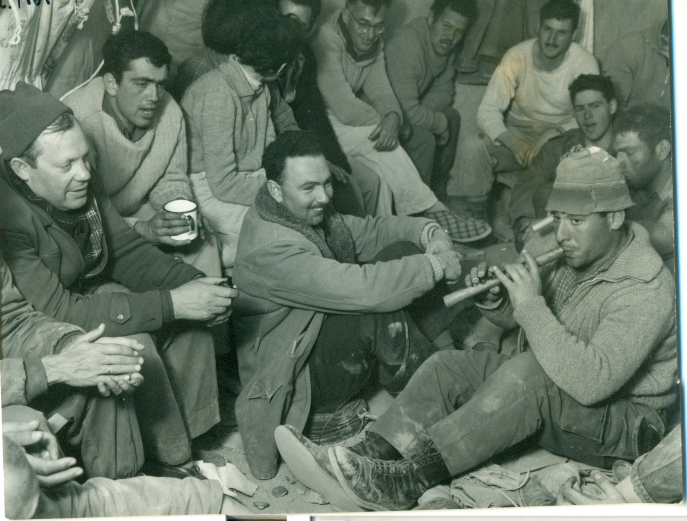 ערב הוואי במשלחת הסקר הארכאולוגי של ישראל של פרופסור יוחנן אהרוני למדבר יהודה. משמאל יוסף אבירם, במרכז פרופסור משה כוכבי